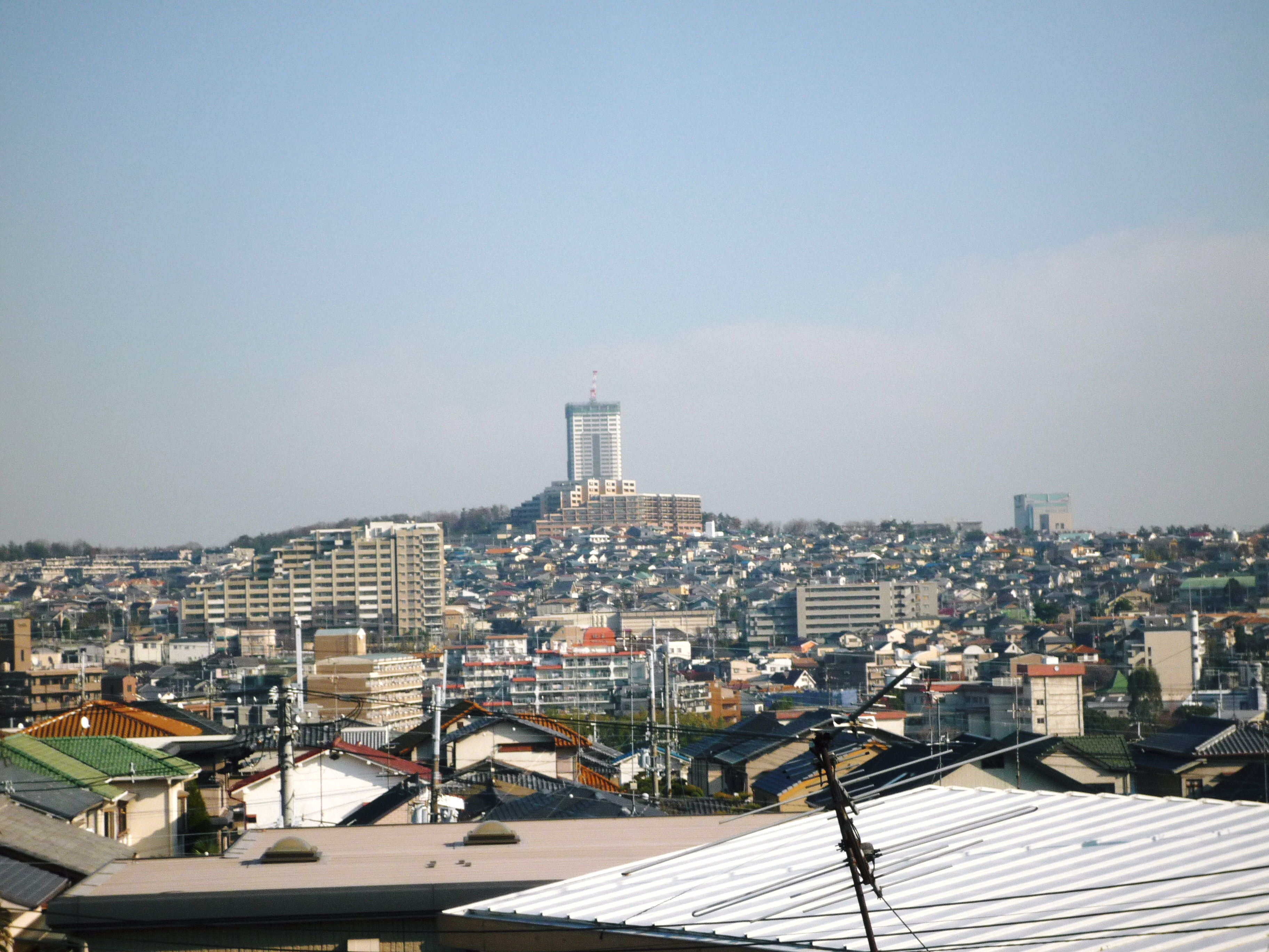 島熊山遠景